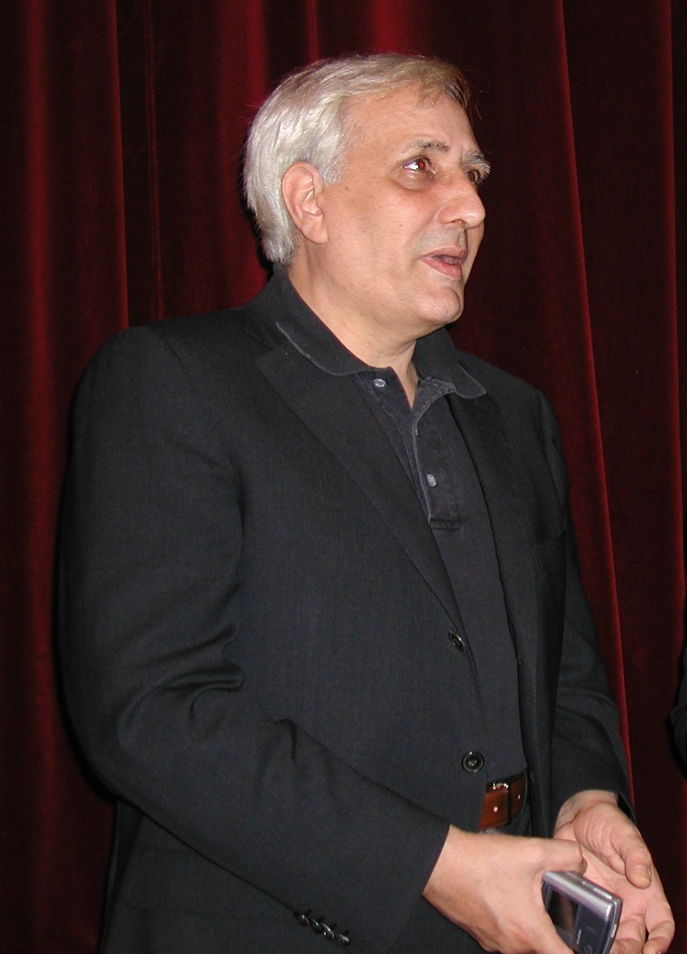 Nicola Grauso al Gran Prix Pubblicità 2007 (28 maggio 2007)